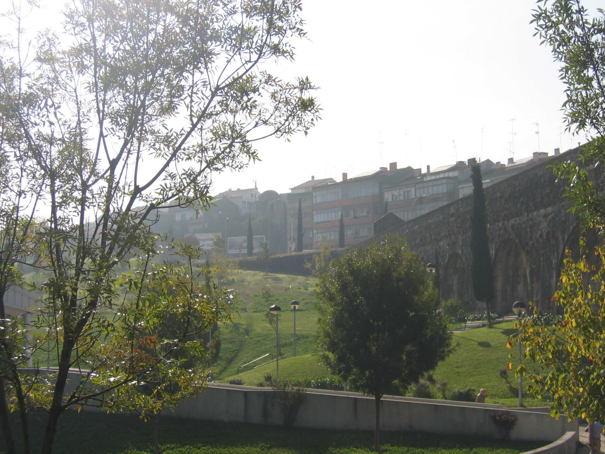 Aqueduto das Águas Livres a passar na Amadora, Damaia.